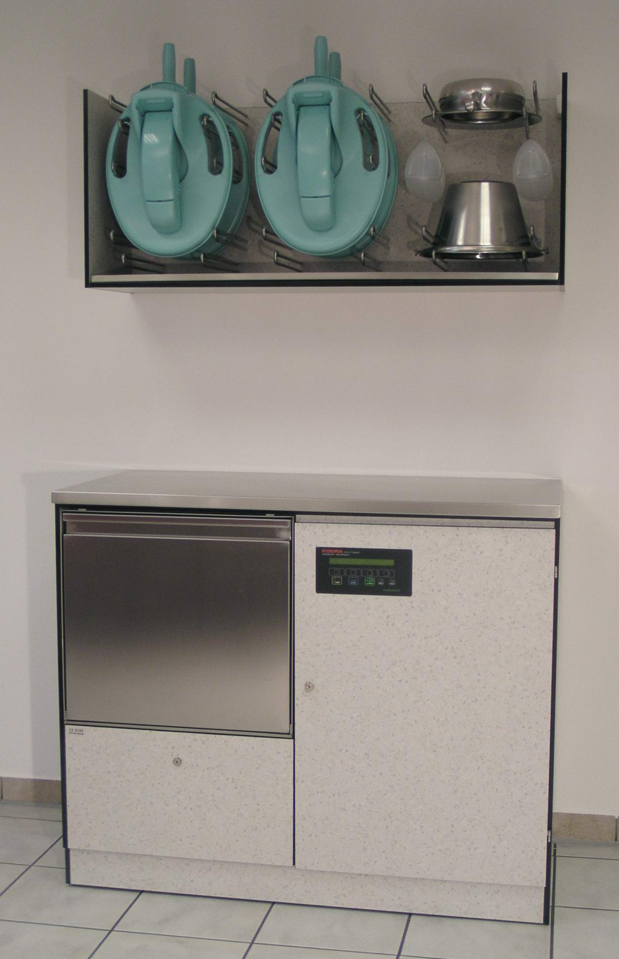 ein Steckbeckenspüler